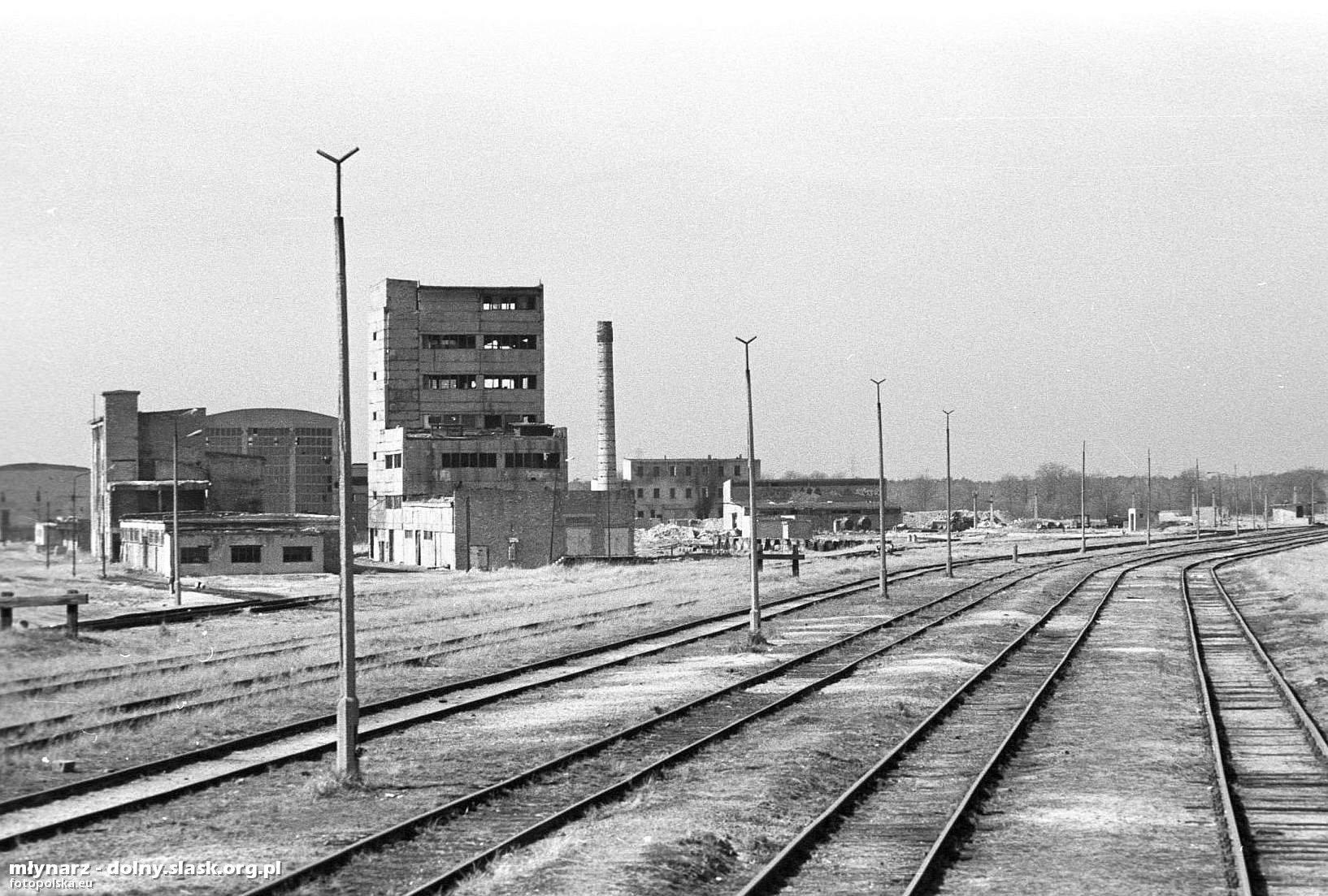 Panorama "Polchemu". Najwyższy budynek to dawna instalacja kwasu chlorosulfonowego oraz chlorosulfuronu. Była to inwestycja zrealizowana za czasów PRL. Instalację wyłączono na końcu lat osiemdziesiątych i od tego czasu straszyła. Korozja wokół tego budynku była niesamowita. W dali widać komin wyburzonej kotłowni zakładowej, oraz zupełnie na trzecim planie jedno z laboratoriów. Polchem posiadał bardzo dużą bocznicę kolejową której tory odstawcze znajdują się na pierwszym planie tego zdjęcia.